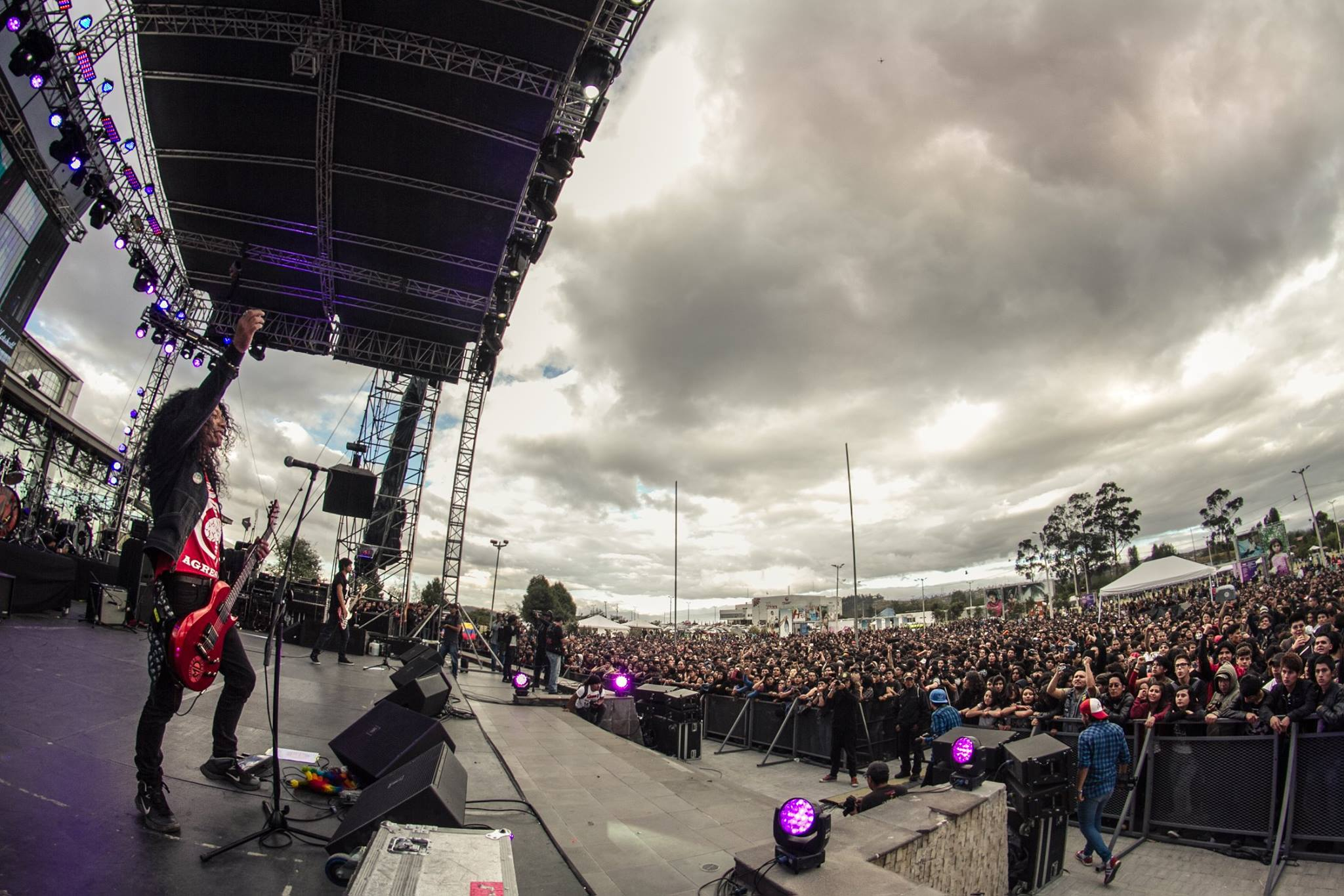 Concierto de la banda durante el Quifest 2016